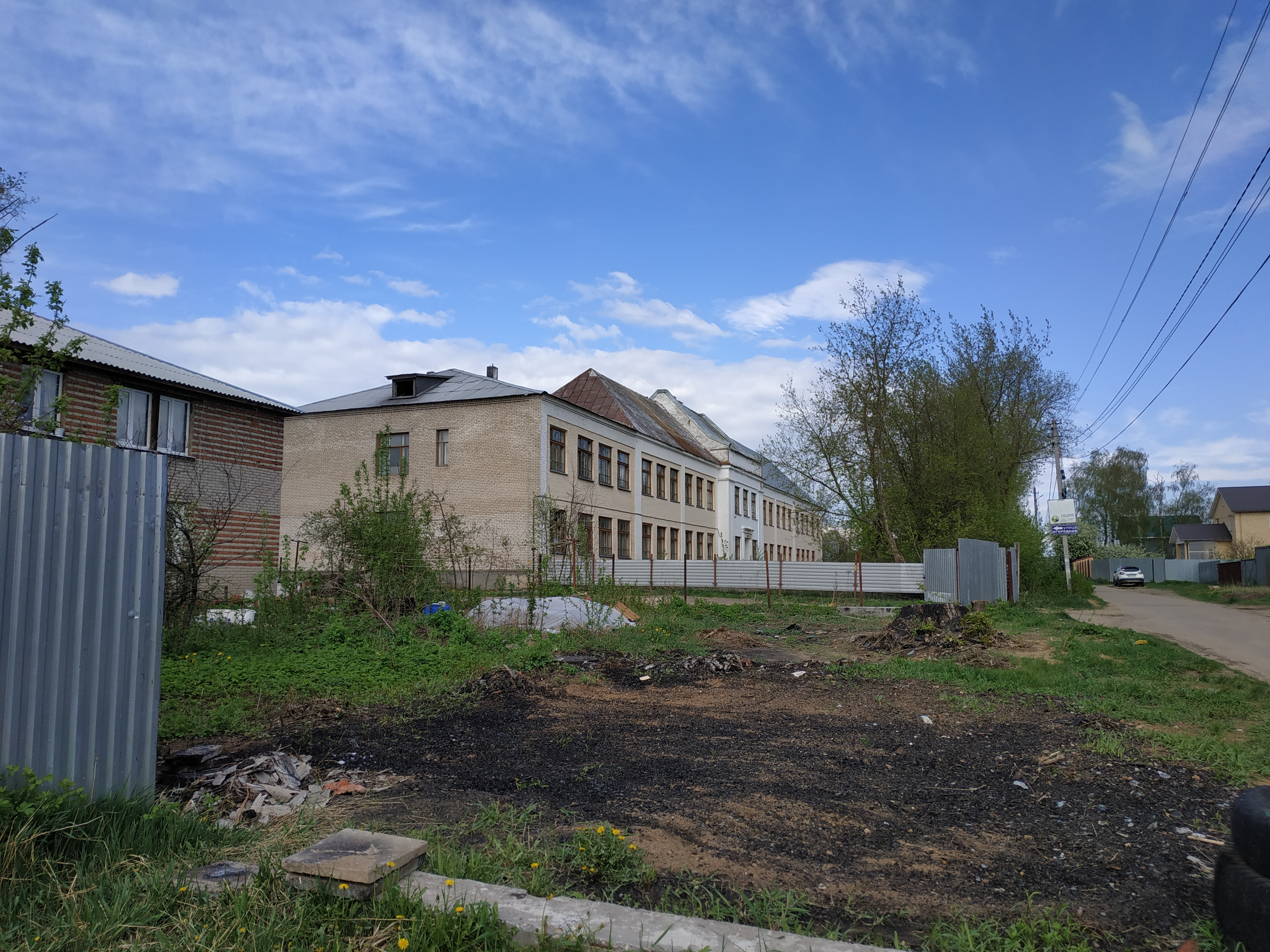 Деревня Клишева, Раменский округ